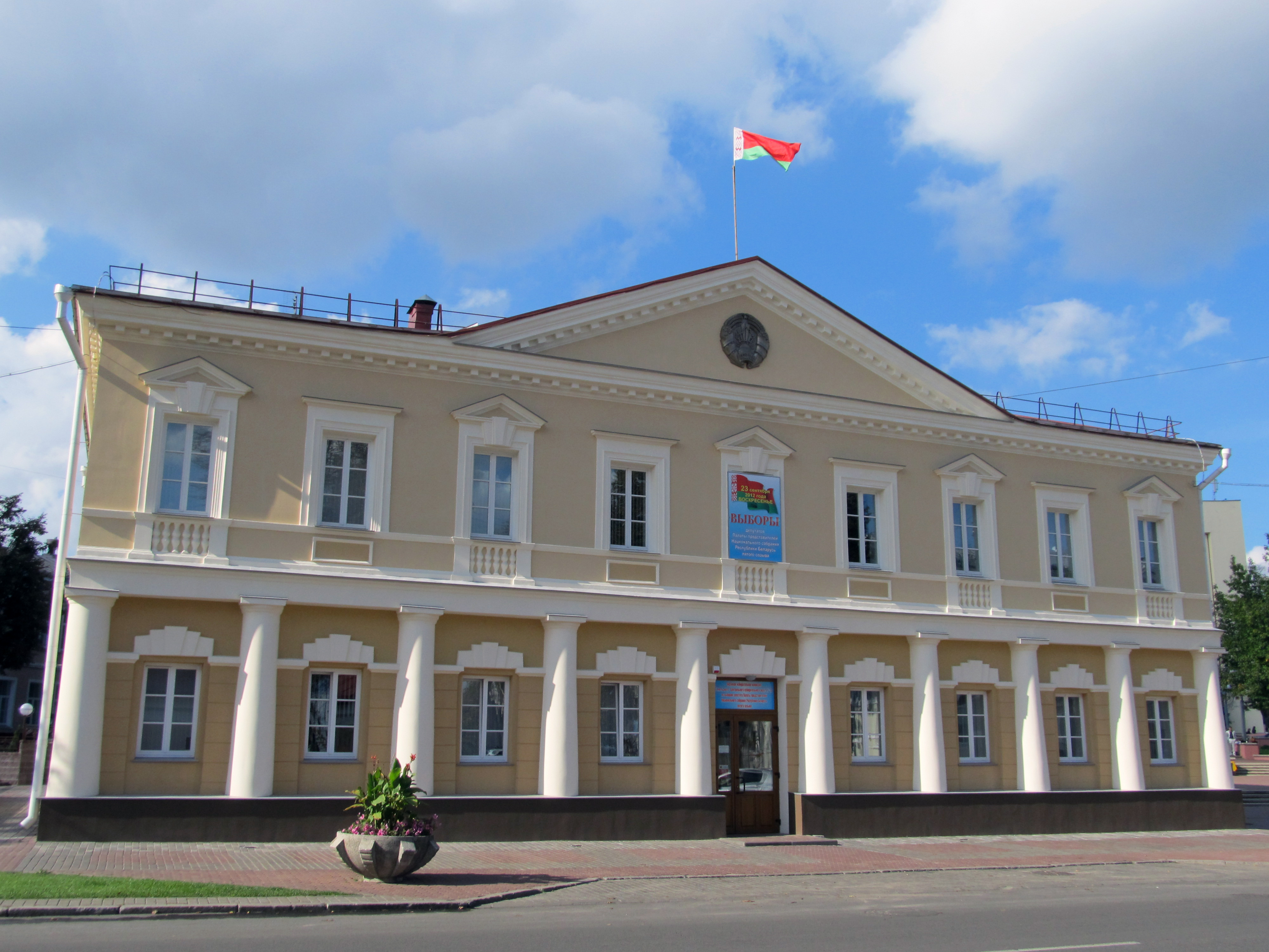 Беларуская (тарашкевіца): Будынак былой расейскай карчмы. г. Гомель This is a photo of Belarusian heritage monument. Reference number: 312Г000009 ( WLM)